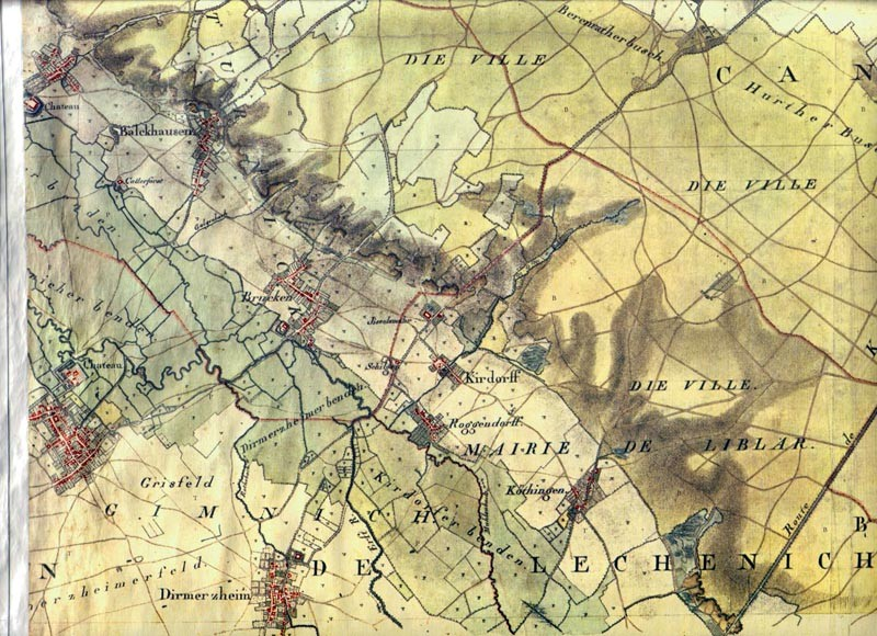 Kartenaufnahme (Ausschnitt) der Rheinlande, cantom de Lechenich